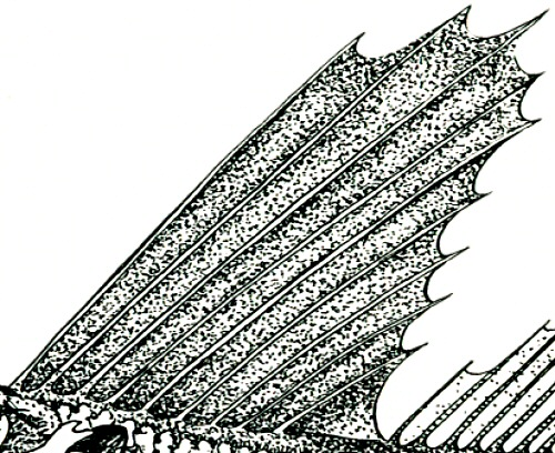 First dorsal fin of Red icefish Channichthys rugosus Regan, 1914, adult male, 283 mm TL, 255 mm SL, Kerguelen Is, Antarctica